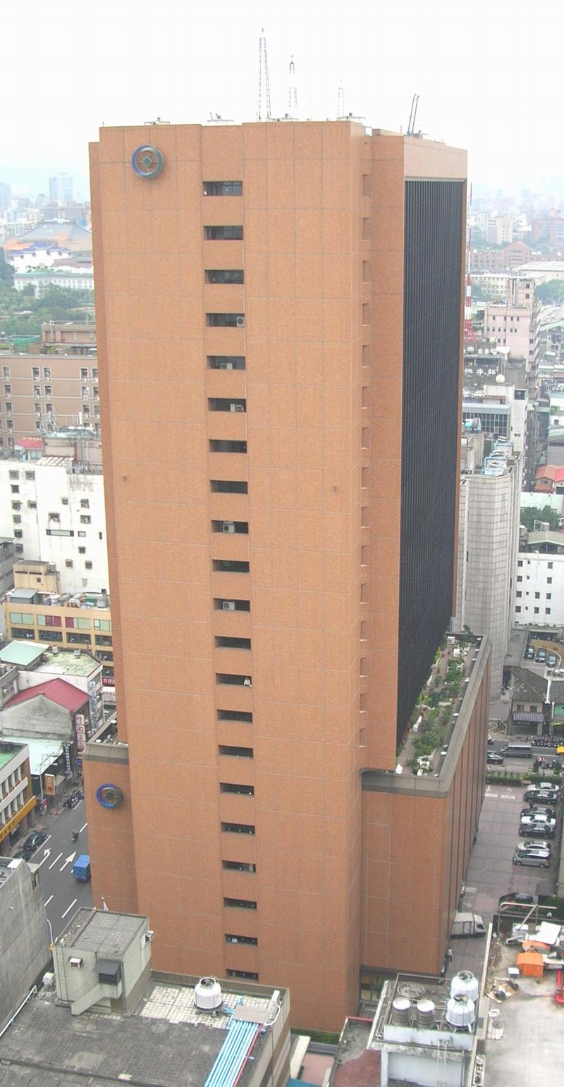 第一金控總部大樓，位於臺北市中正區重慶南路一段30號。